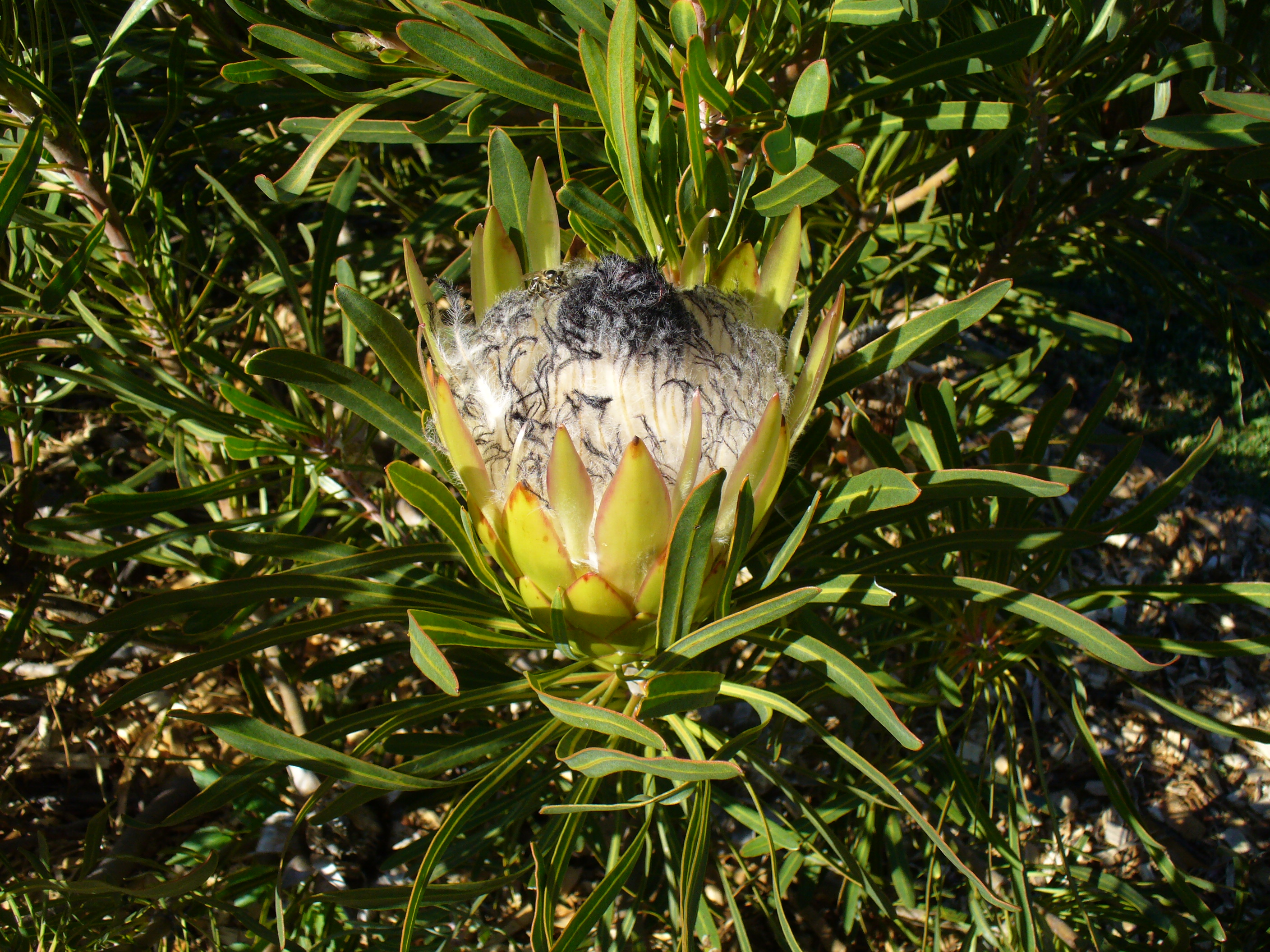 Kirstenbosch Gardens Cape Town